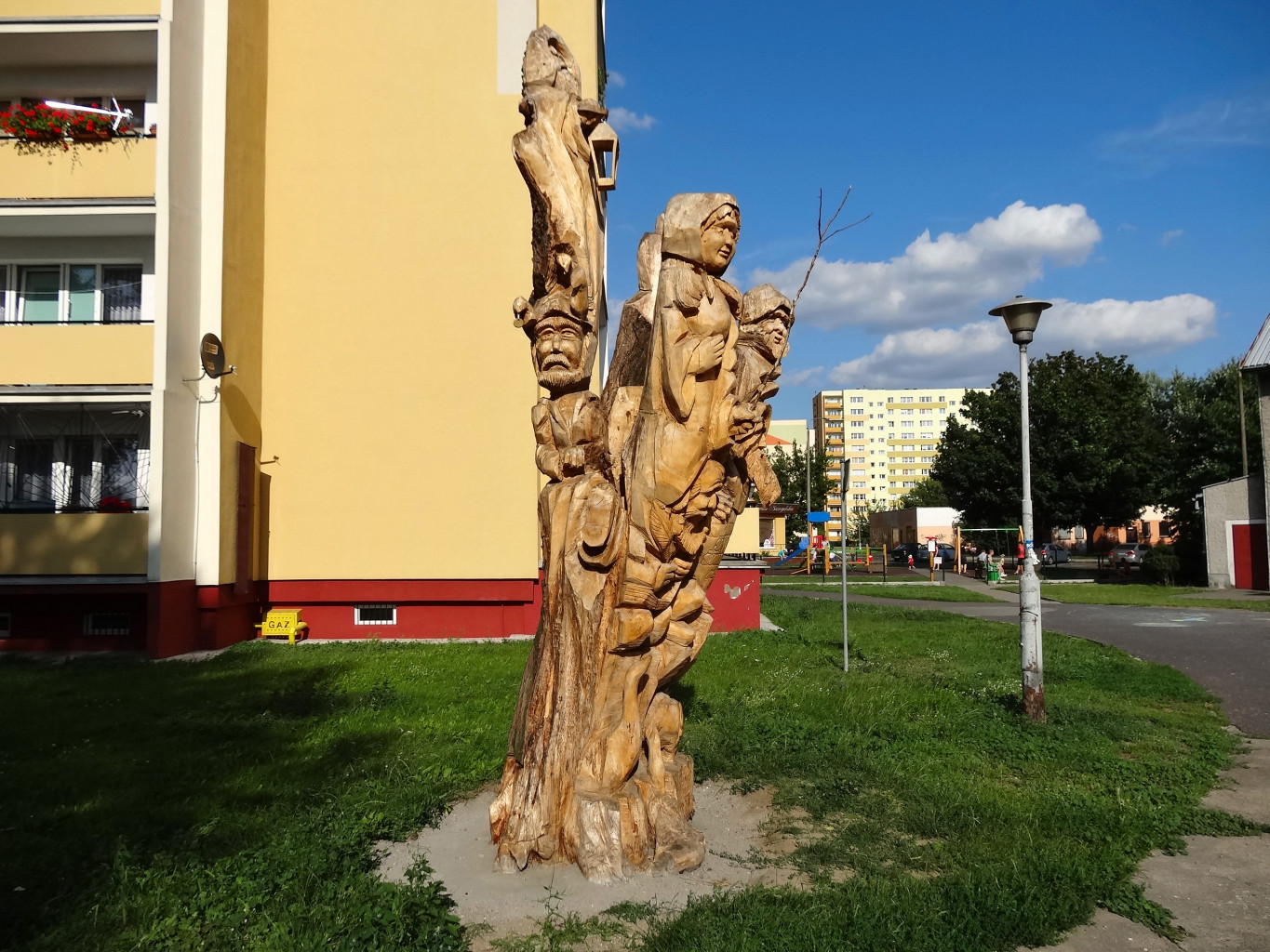 Rzeźba drewniana na osiedlu Szwederowo w Bydgoszczy